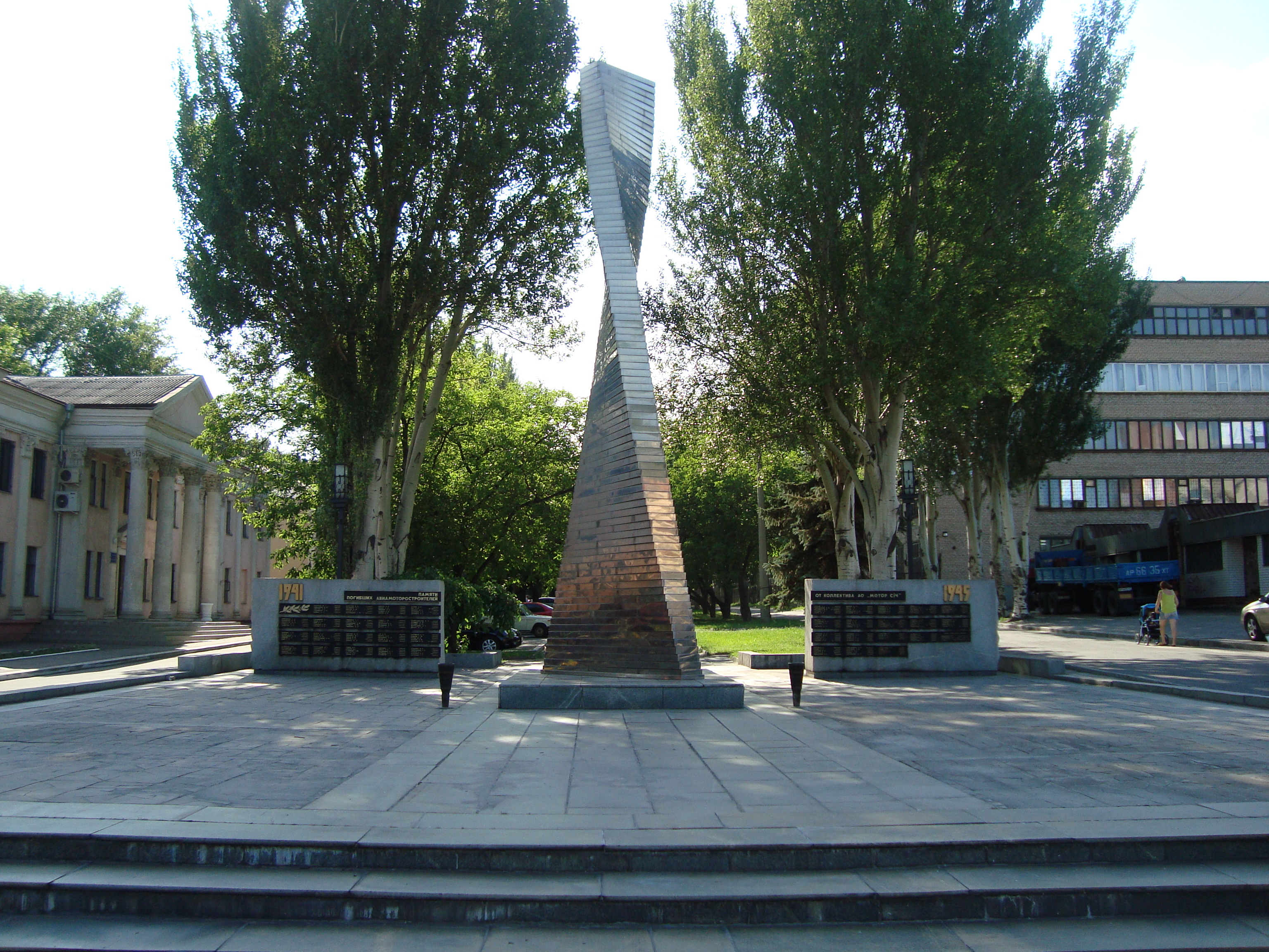 Памятник героям-моторостроителям в Запорожье, возле завода Мотор Сич